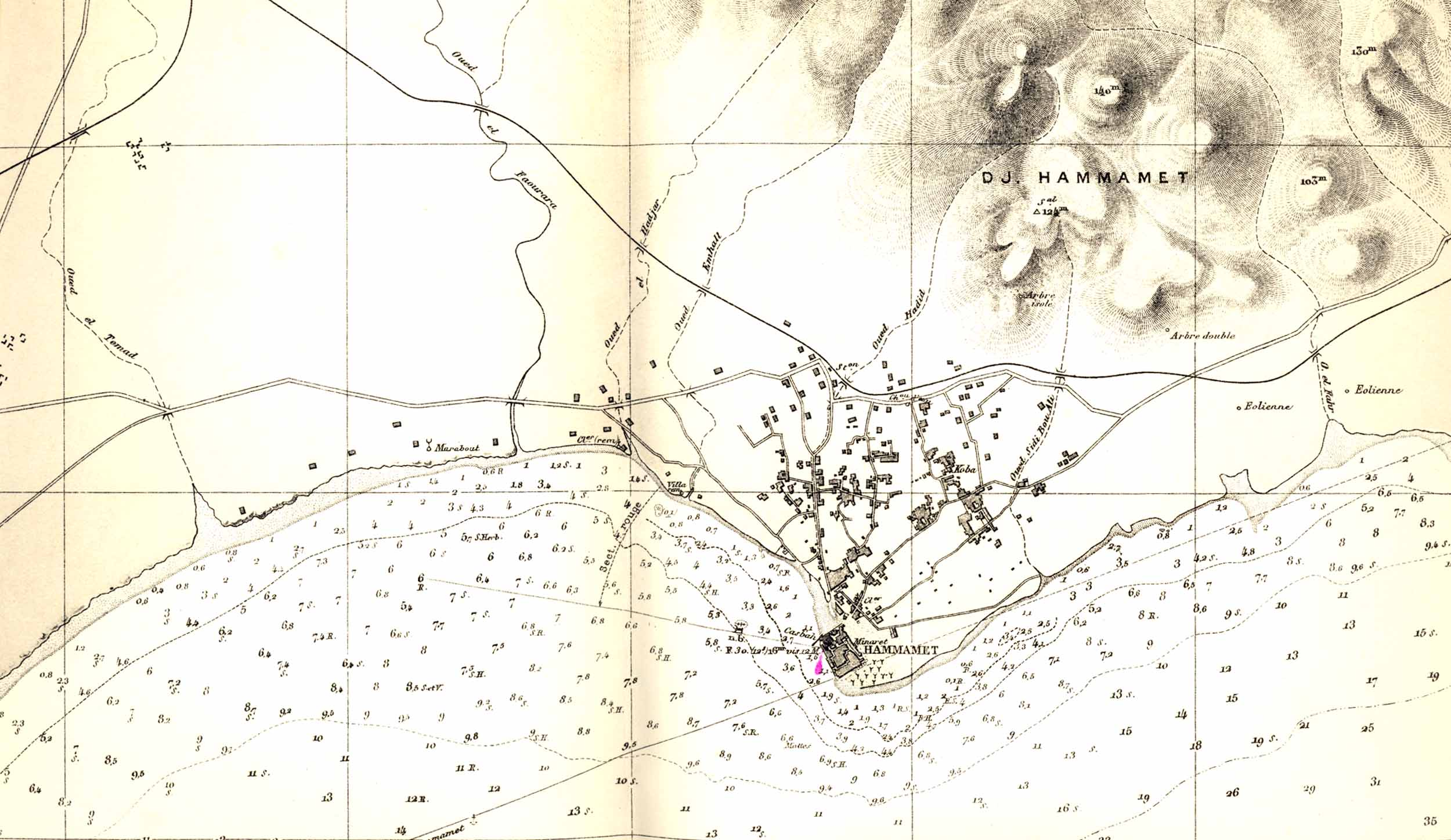 Hammamet, la ville et le golfe. Fond de carte de 1883 - Mise à jour des voies de communication et points remarquables en 1954